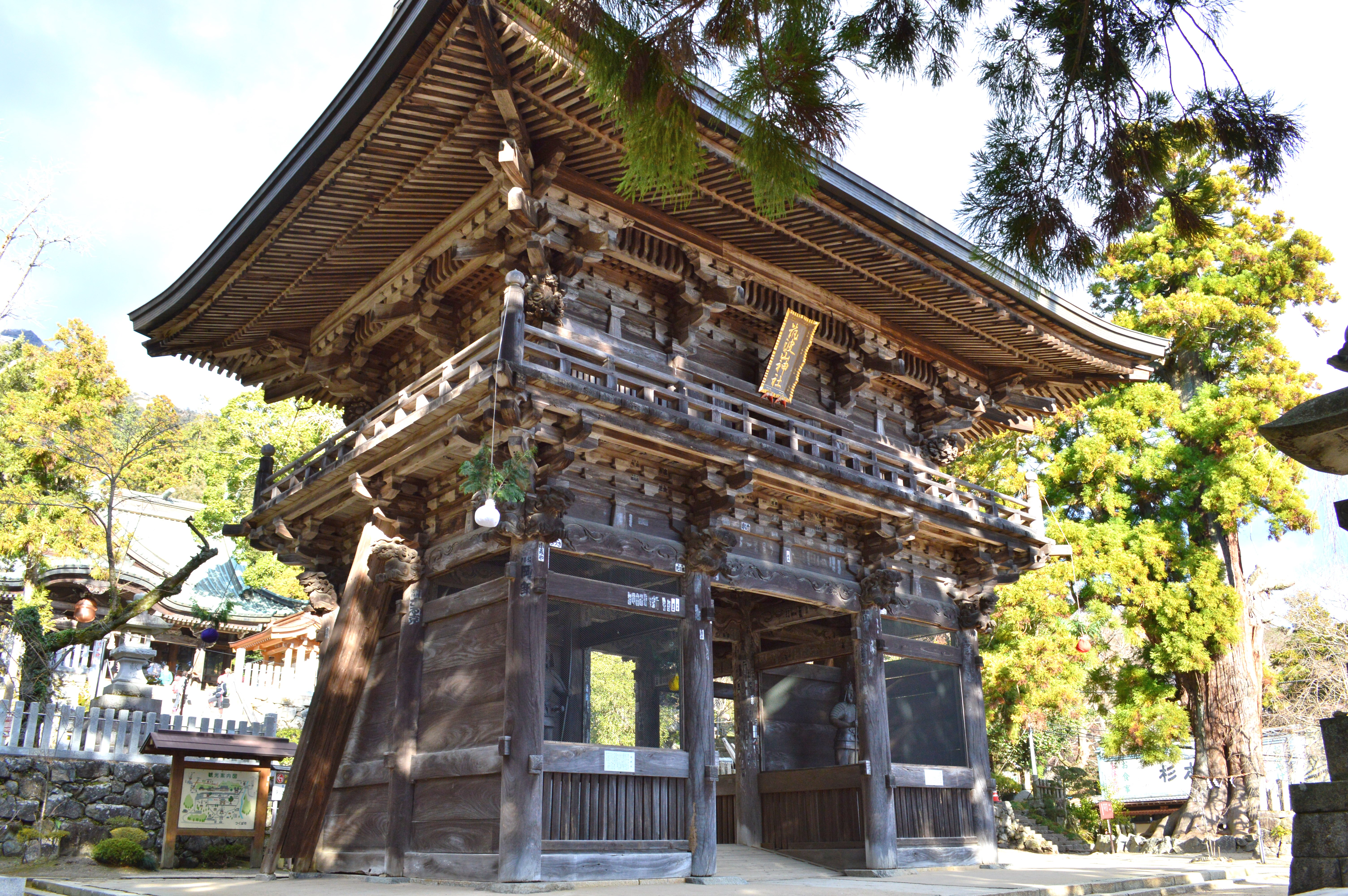 筑波山神社 随身門